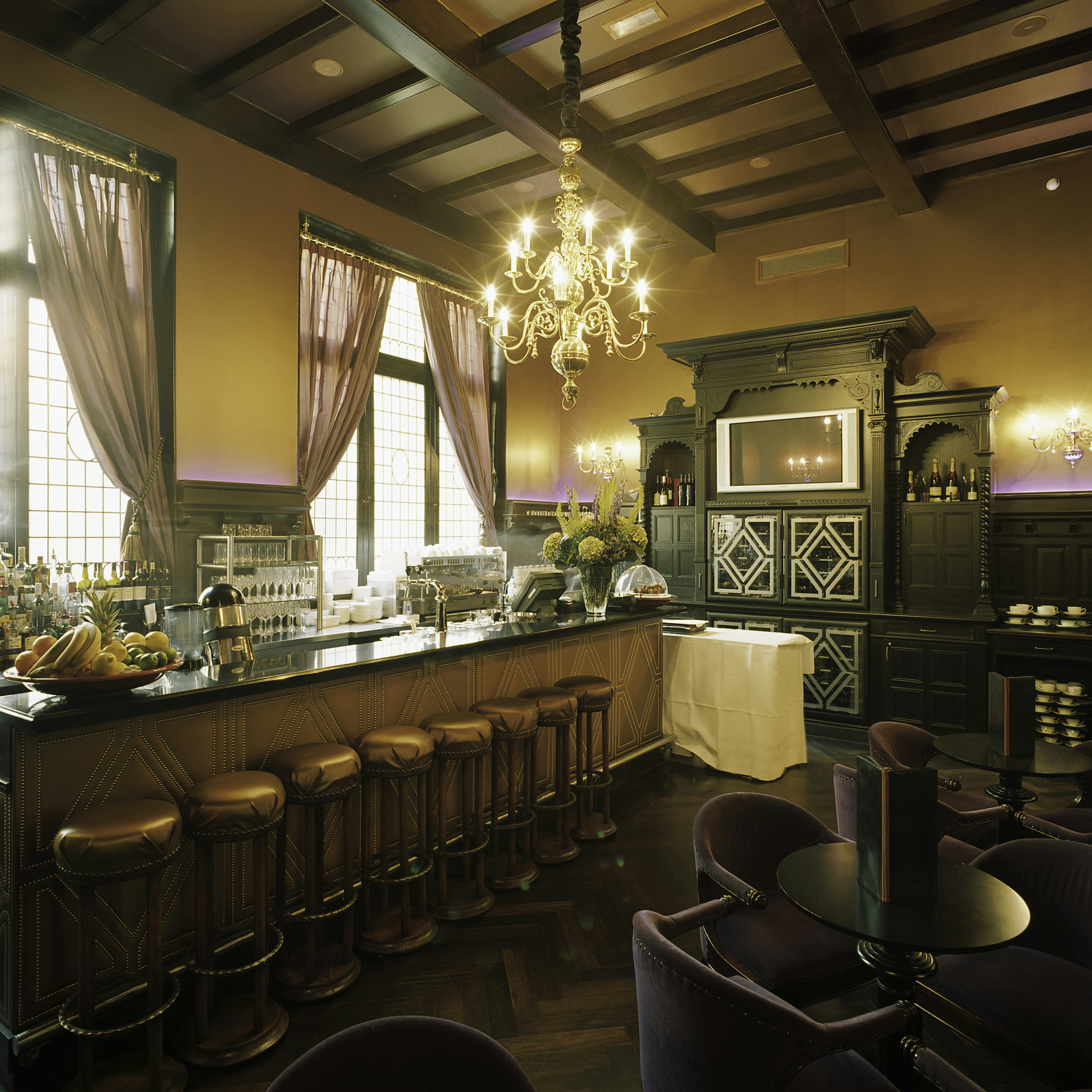 Hotel des Indes: Interieur, overzicht van het bargedeelte